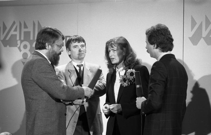 6.3.1983 Wahl-Party der Grünen in der Godesberger Stadthalle. Information added by Wikimedia users.Ergänzung: Links Peter Gatter, deutscher Journalist, Hörfunk- und Fernsehmoderator.